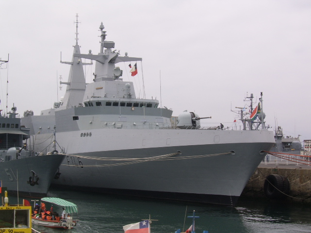 SAS Isandlwana in Valparaiso, Chile